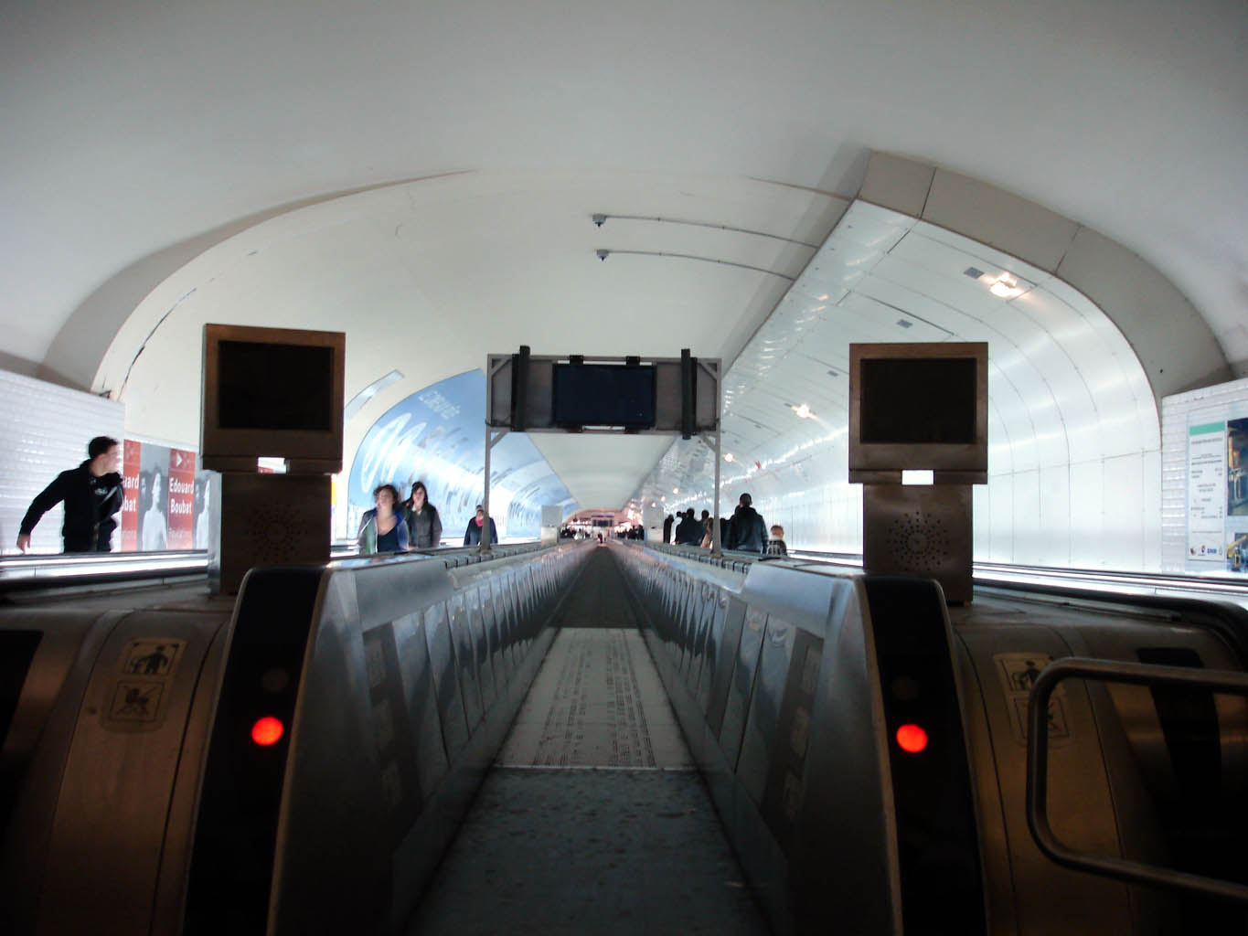 Métro de Paris (France) - Station Montparnasse - Bienvenüe - Tapis roulant Gateway